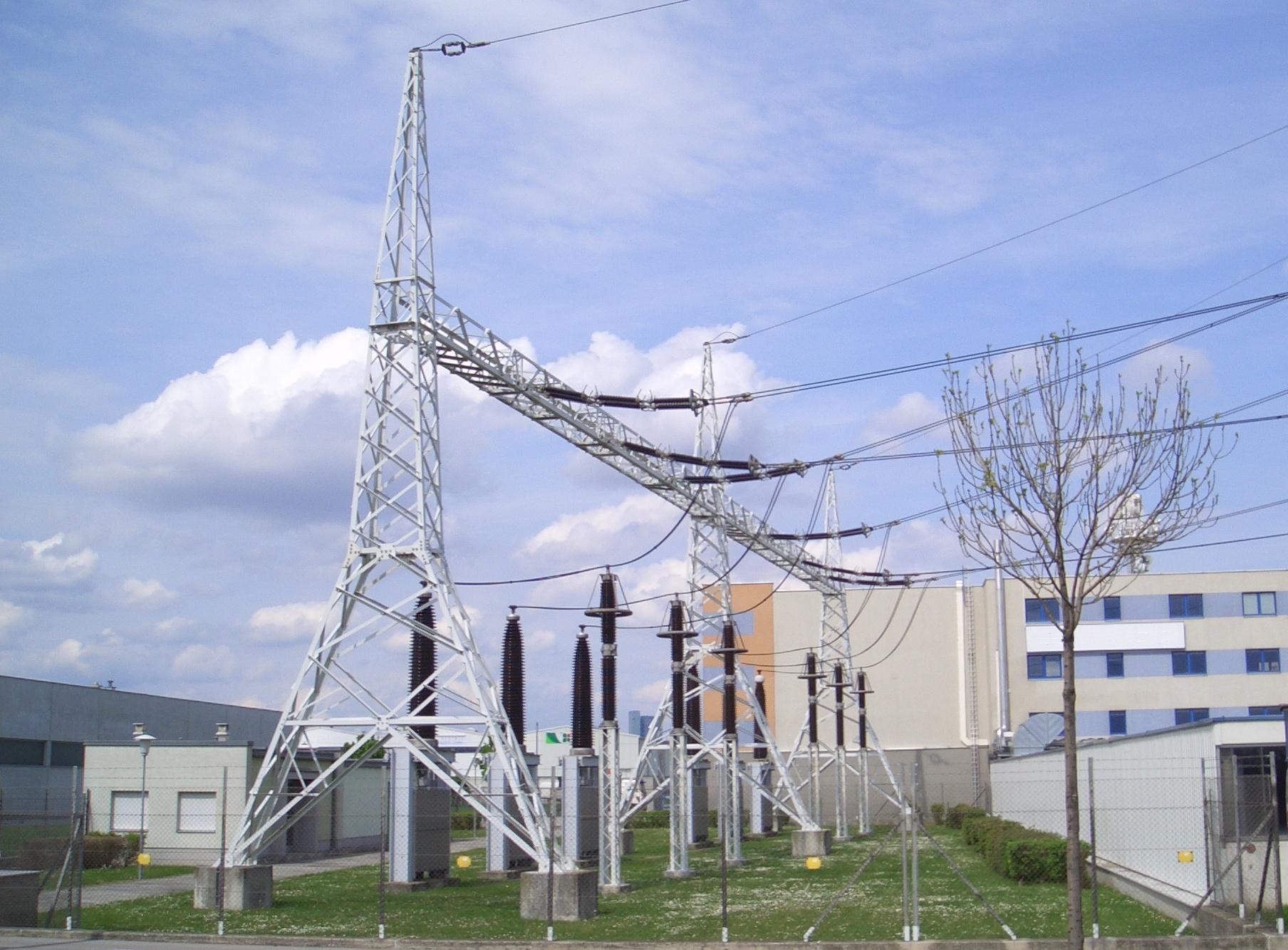 380-kV-Erdkabelstation Pfarrgasse (Vorarlberger Allee), Teil der 380-kV-Leitung zwischen dem Umspannwerk Wien-Südost (APG) und dem Umspannwerk Wien-Süd (Wiener Netze)